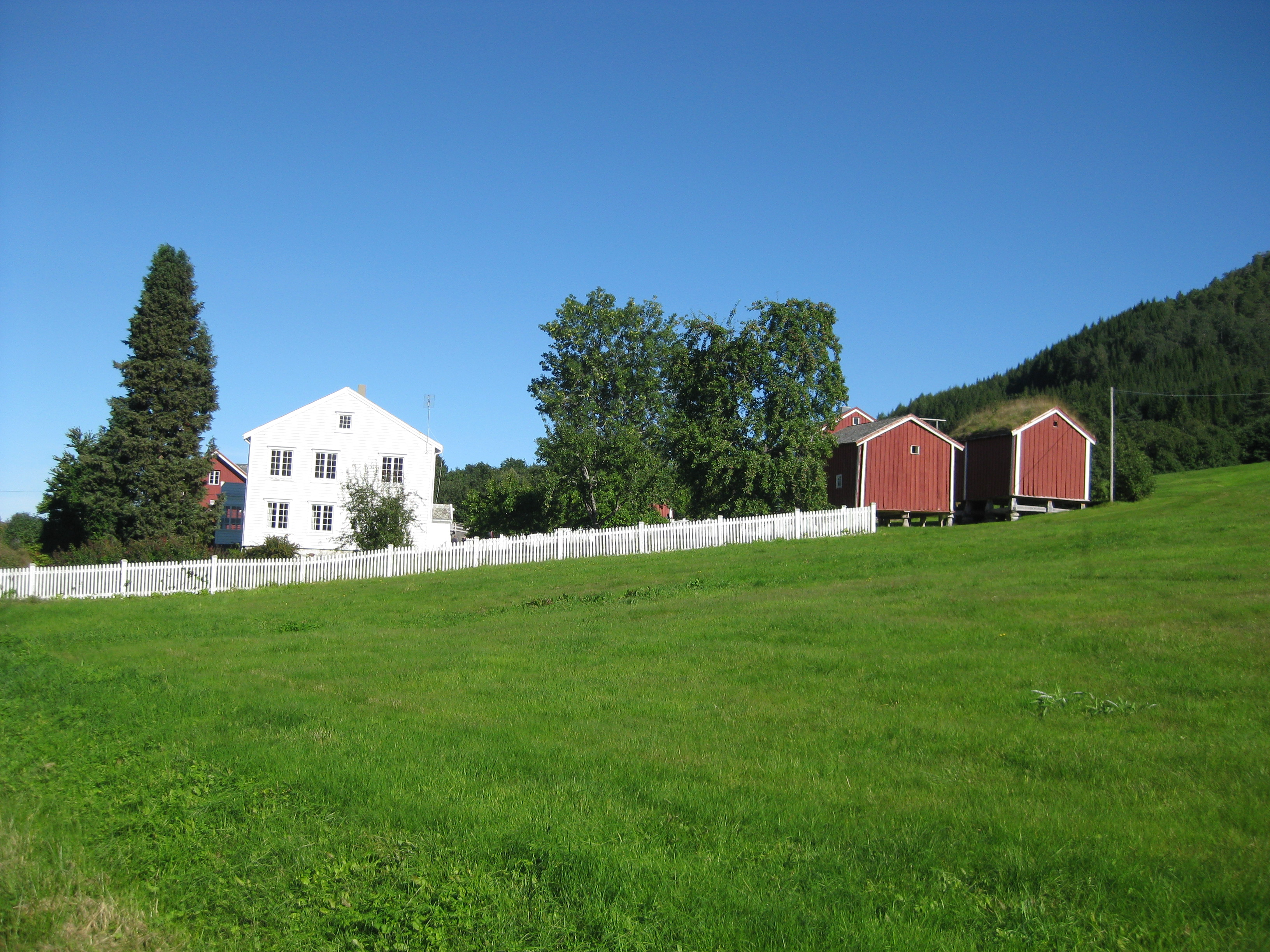 Nesset Prestegard, Nesset, Barndomshjemmet til den norske forfatteren Bjørnstjerne Bjørnson.